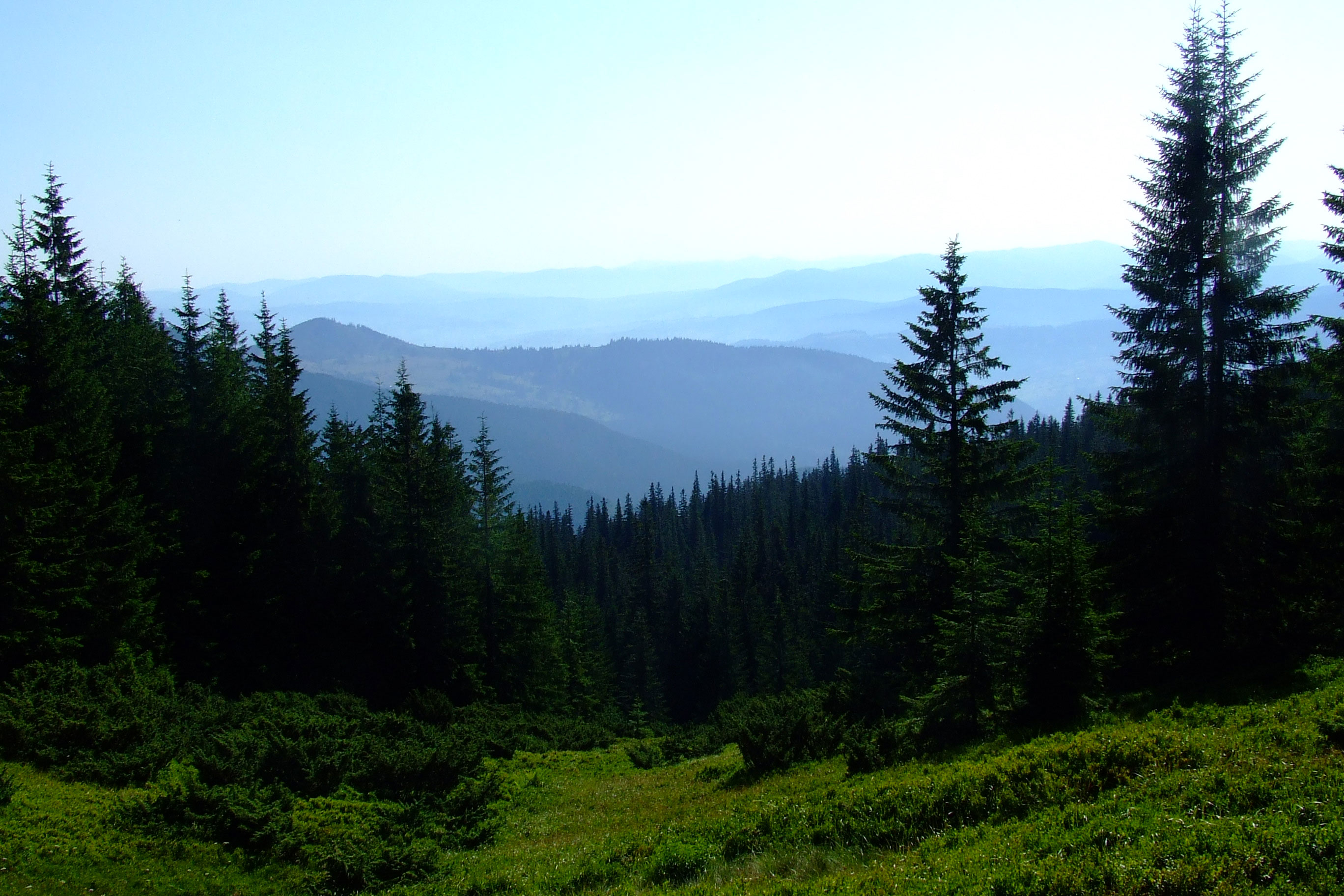 Карпатський біосферний заповідник, Рахівський, Тячівський, Хустський, Виноградівський райони